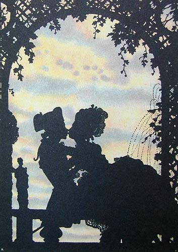 Иллюстрация к "Книге Маркизы", Иллюстрация к "Книге Маркизы"